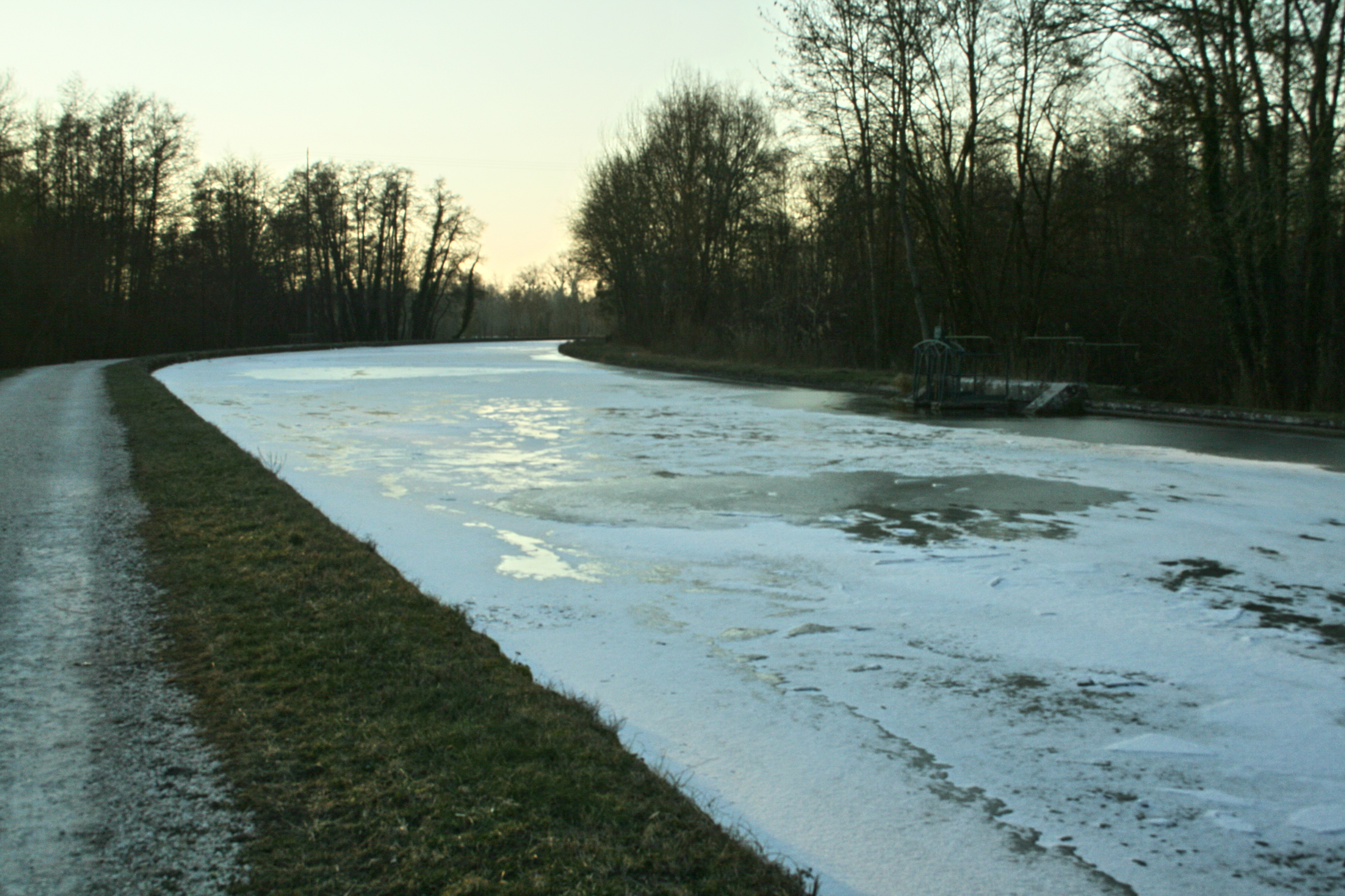 Le canal du Loing à Épisy, en Seine et Marne, pris dans la glace.